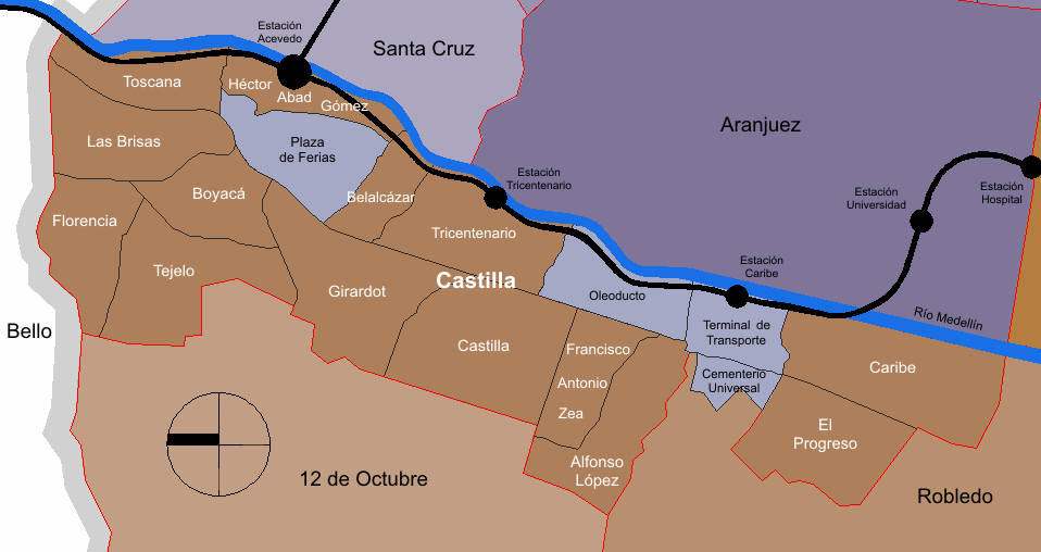 mapa de la división barrial de la comuna Castilla. Medellín, Colombia.